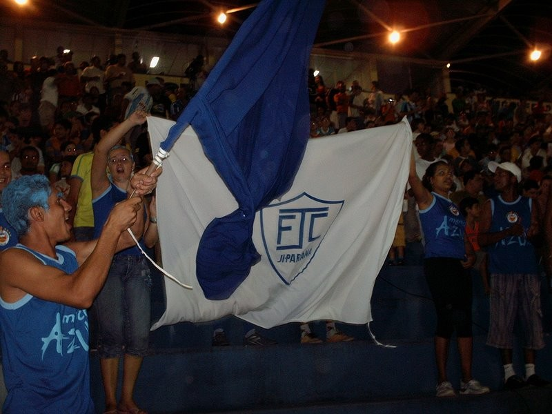 Torcida Organizada Mancha Azul: a maior torcida organizada de RondÃ´nia. Sempre presente nos jogos do Ji-ParanÃ¡ Futebol Clube.